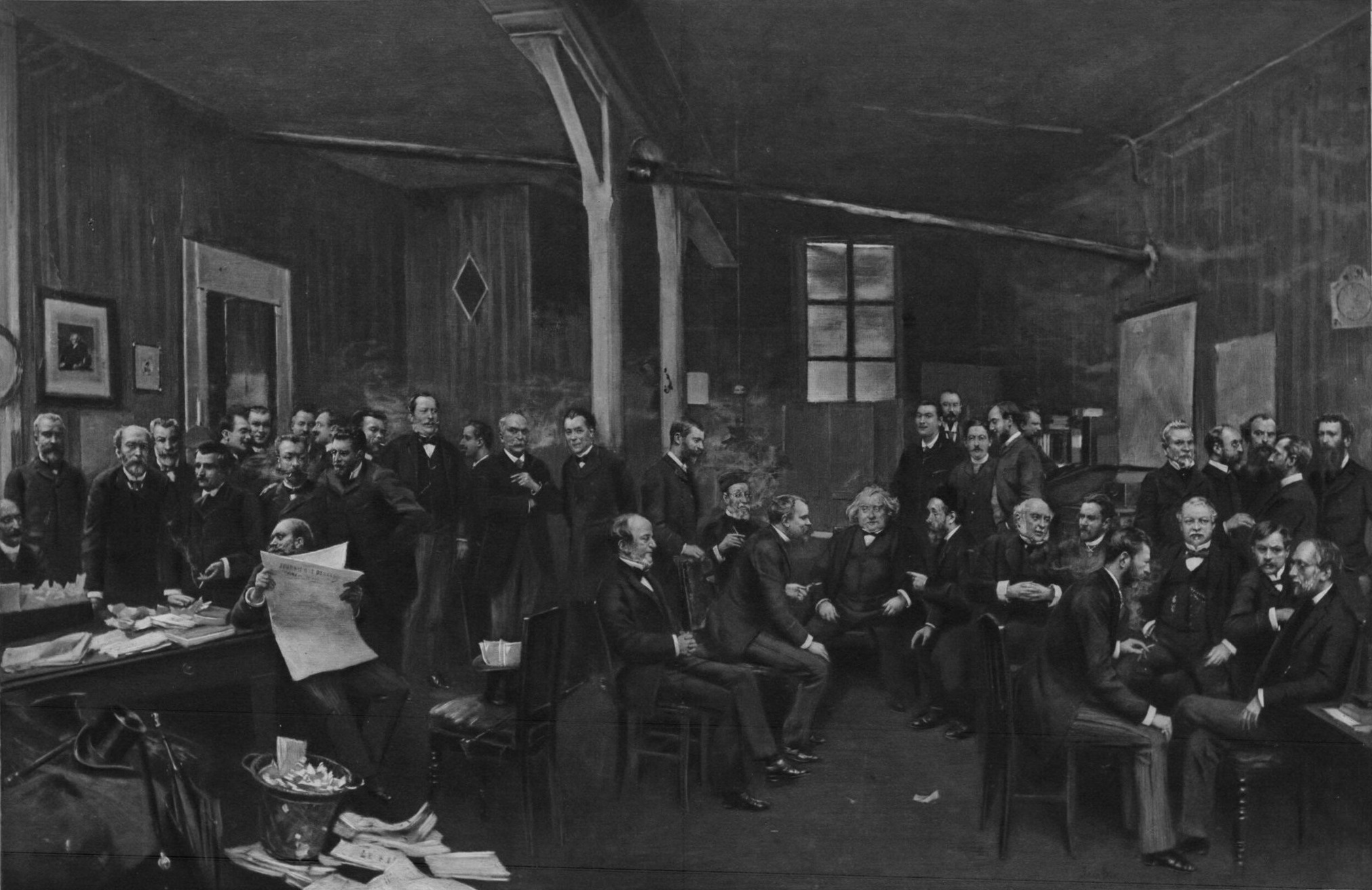 "Salle de rédaction du Journal des débats en 1889" (héliographie de P. Dujardin d'après une peinture de Jean Béraud).